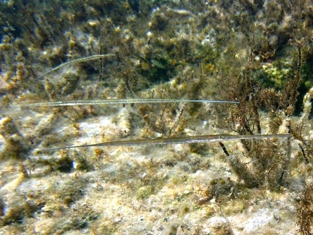 Fistularia commersonii photographed in Crete, Greece.